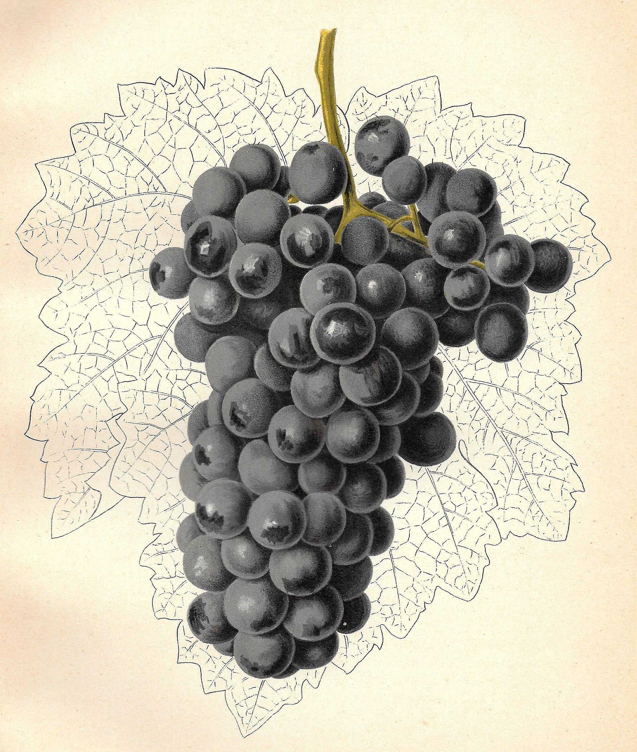 Blauer Portugieser